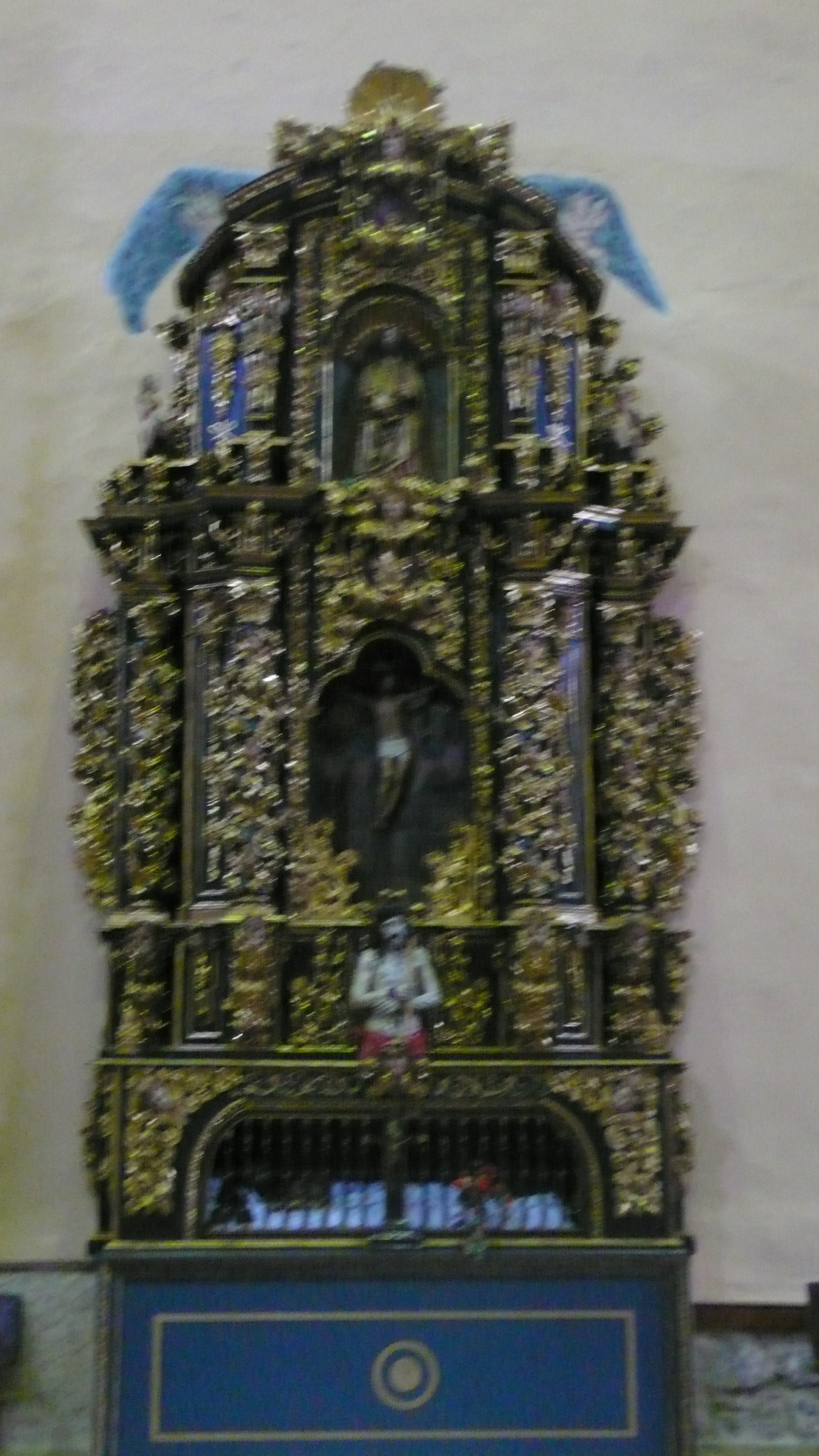 retablo lateral del santo cristo de la iglesia de san andres